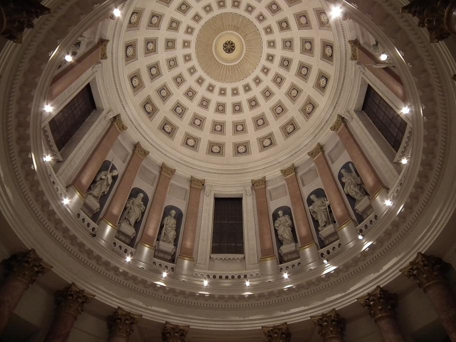 Kuppel der Elisabethkirche in Nürnberg